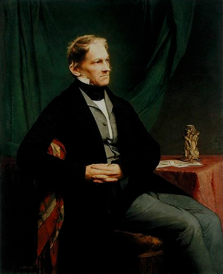 Porträt Georg Ernst Harzen (1790-1863), Kunsthändler und Förderer der Hamburger Kunsthalle, Auftragsarbeit für die Hamburger Kunsthalle